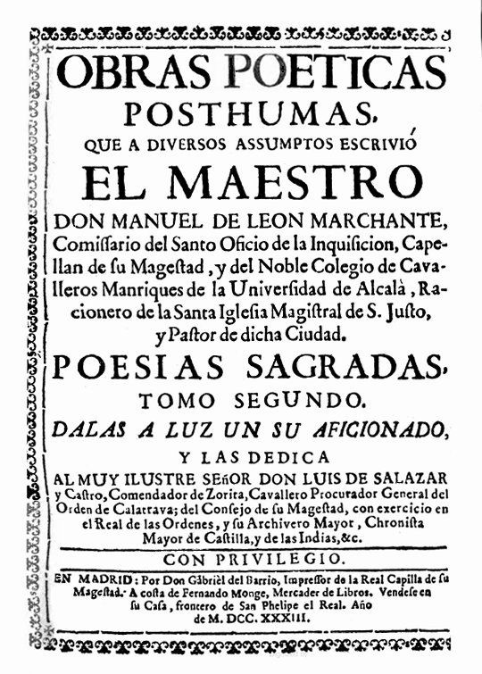 Portada del libro Obras poéticas phostumas (tomo II) de Manuel de León Marchante. Recopilación de Fernando Monge publicada en Madrid, edición de 1733.